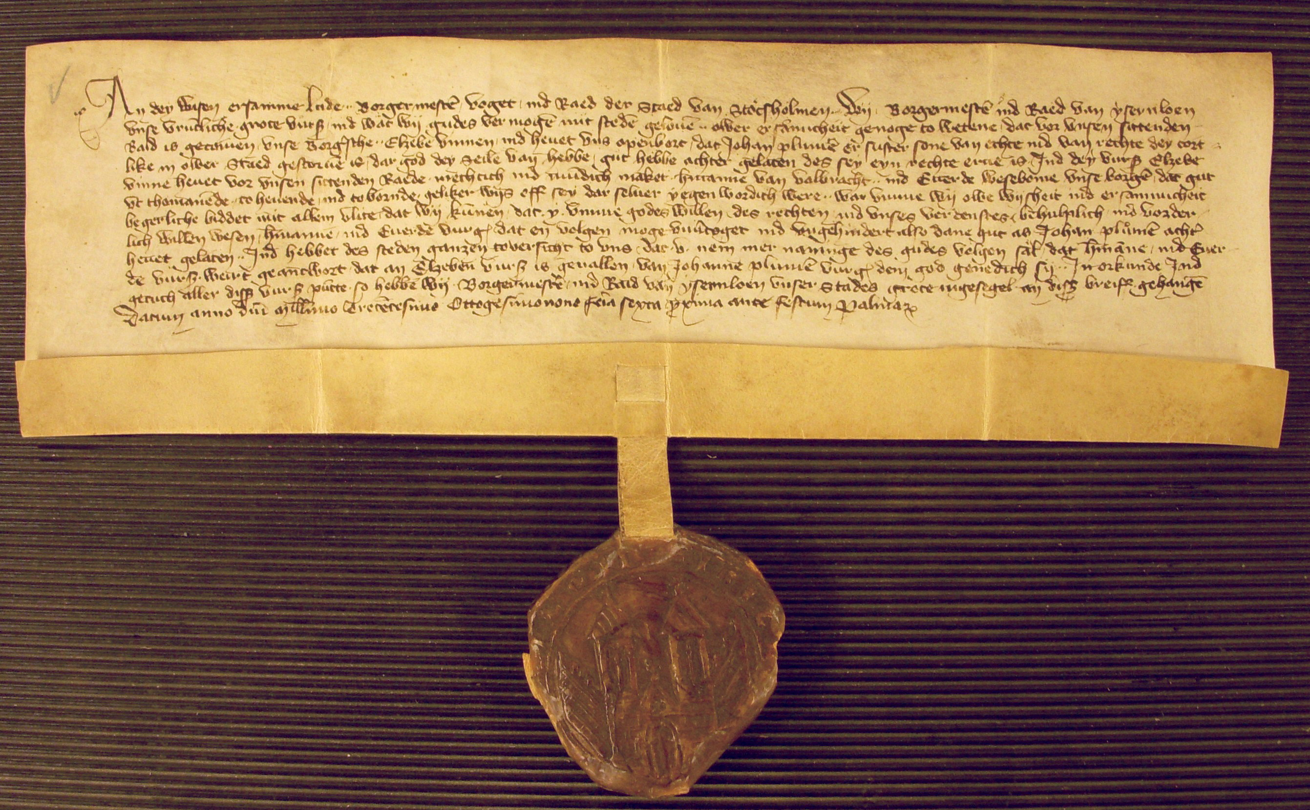 Det äldsta dokument som förvaras i Stockholms stadsarkivet härstammar från den 9 april 1389 och är från borgmästare och råd i tyska staden Iserlohn (Ysernlohen) i Westfalen till borgmästare, fogde och och råd i Stockholm.